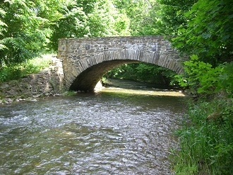 Salzbrücke zwischen Falkenberg und Krummenhennersdorf